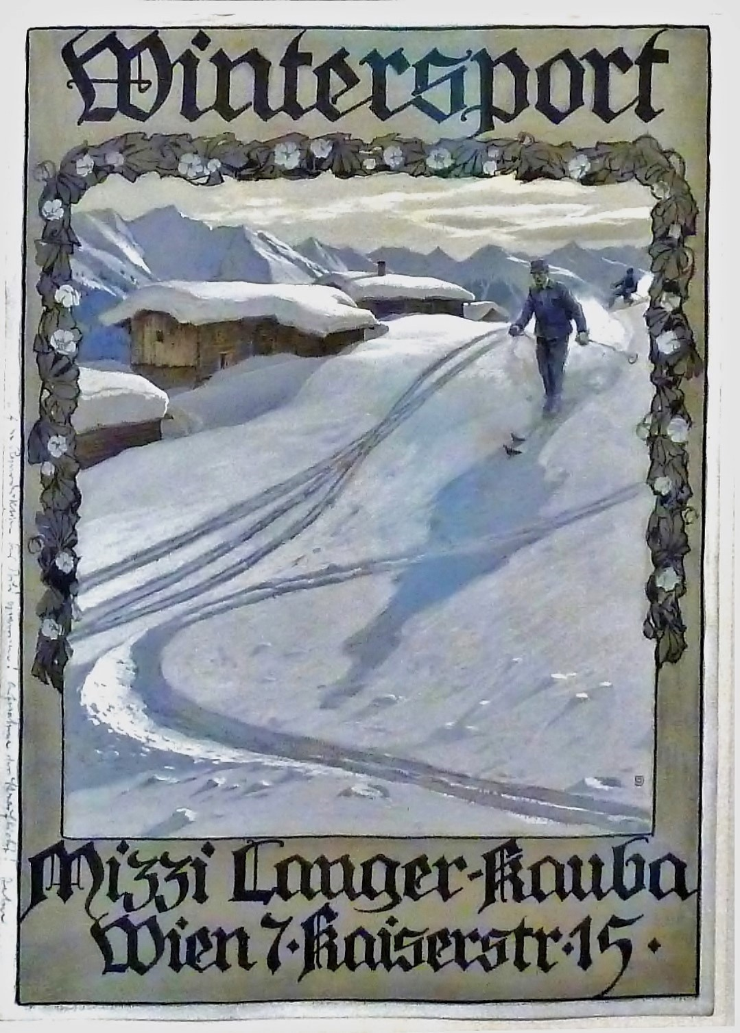 Plakat für das Bergsporthaus von Mizzi Langer-Kauber